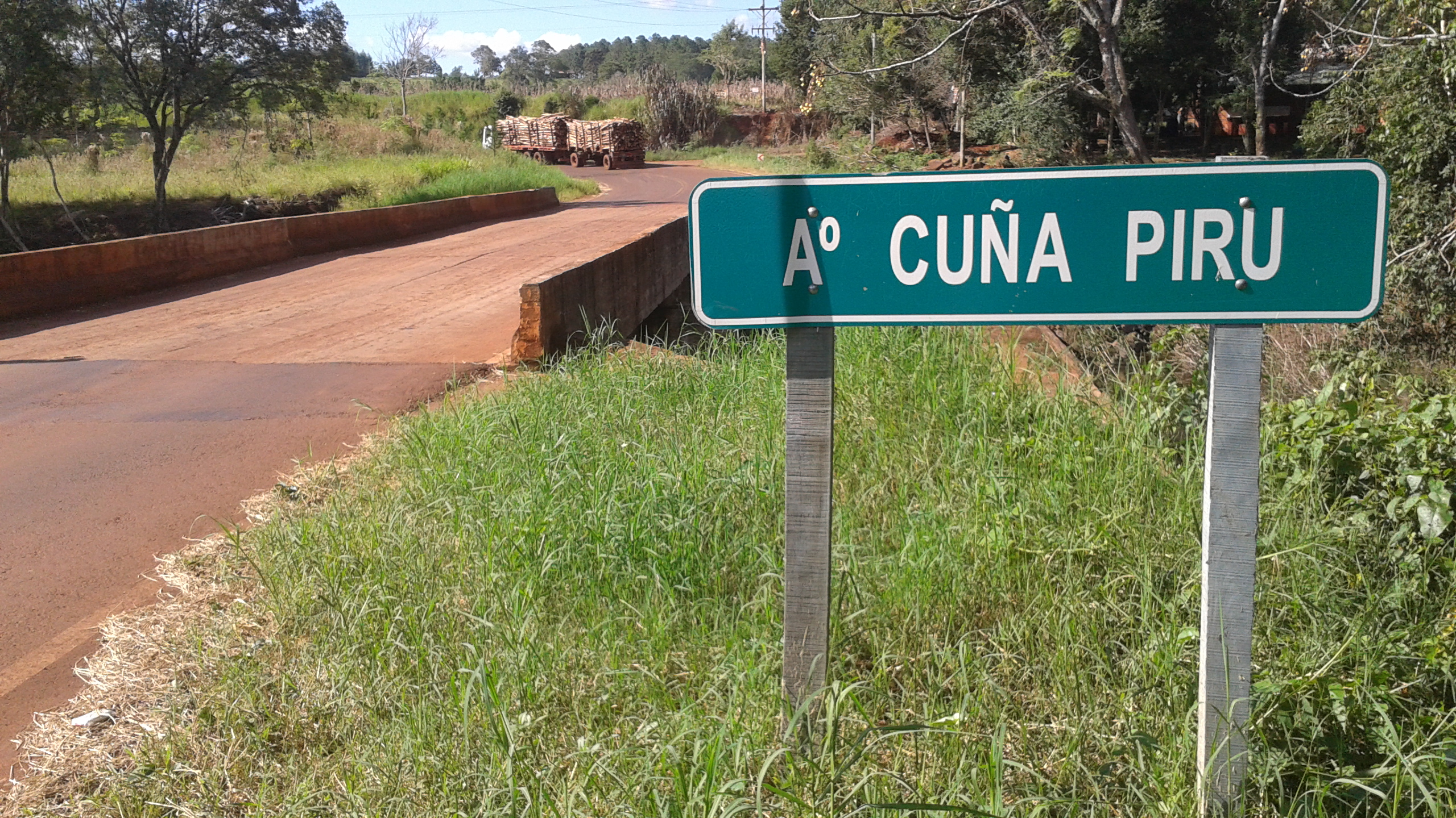 Cartel Arroyo Cuña Pirú, cerca de Ruiz de Montoya (Provincia de Misiones, Argentina), por Ruta Provincial 223